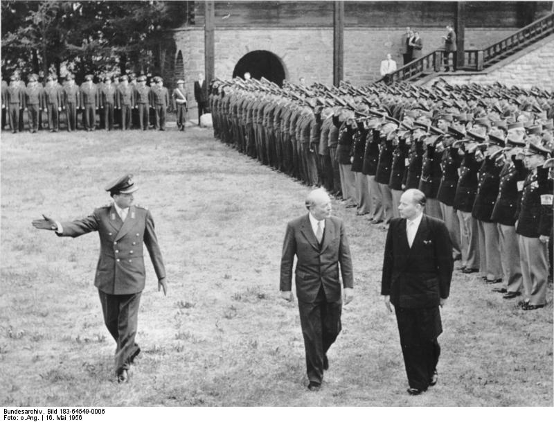 Note: This description has been identified as biased or incorrect: This text is GDR propaganda language replacing the proper titles and functions of the persons shown improperly. e.g. Kriegsminister (minister of war) instead of Verteidigungsminister (minister of defence). Also General Speidel ist titled Nazigeneral, meant as insult. Zentralbild 27.5.1959 Blank besucht Generalslehrgang Bundeskriegsminister Theodor Blank und der bayrische Ministerpräsident Dr. Wilhelm Högner statteten am 15.Mai 1956 den ersten Offizierslehrgang auf der kürzlich in "General Ludwig Beck-Kaserne" umbenannten Ordensburg Sonthofen einen Besuch ab. Unter den rund 300 Teilnehmern des Lehrganges befinden sich sieben Generale der Bundeswehr sowie Träger hoher faschistischer Kriegsauszeichnungen. UBz: Nachdem Nazigeneral Speidel (links im Bild) den Lehrgang an Kriegsminister Blank gemeldet hatte, schritt dieser in Begleitung von Ministerpräsident Högner die Front ab. Im Vordergrund rechts eine in Sonthofen stationierten amerikanische Ausbildungseinheit. -16.5.1956